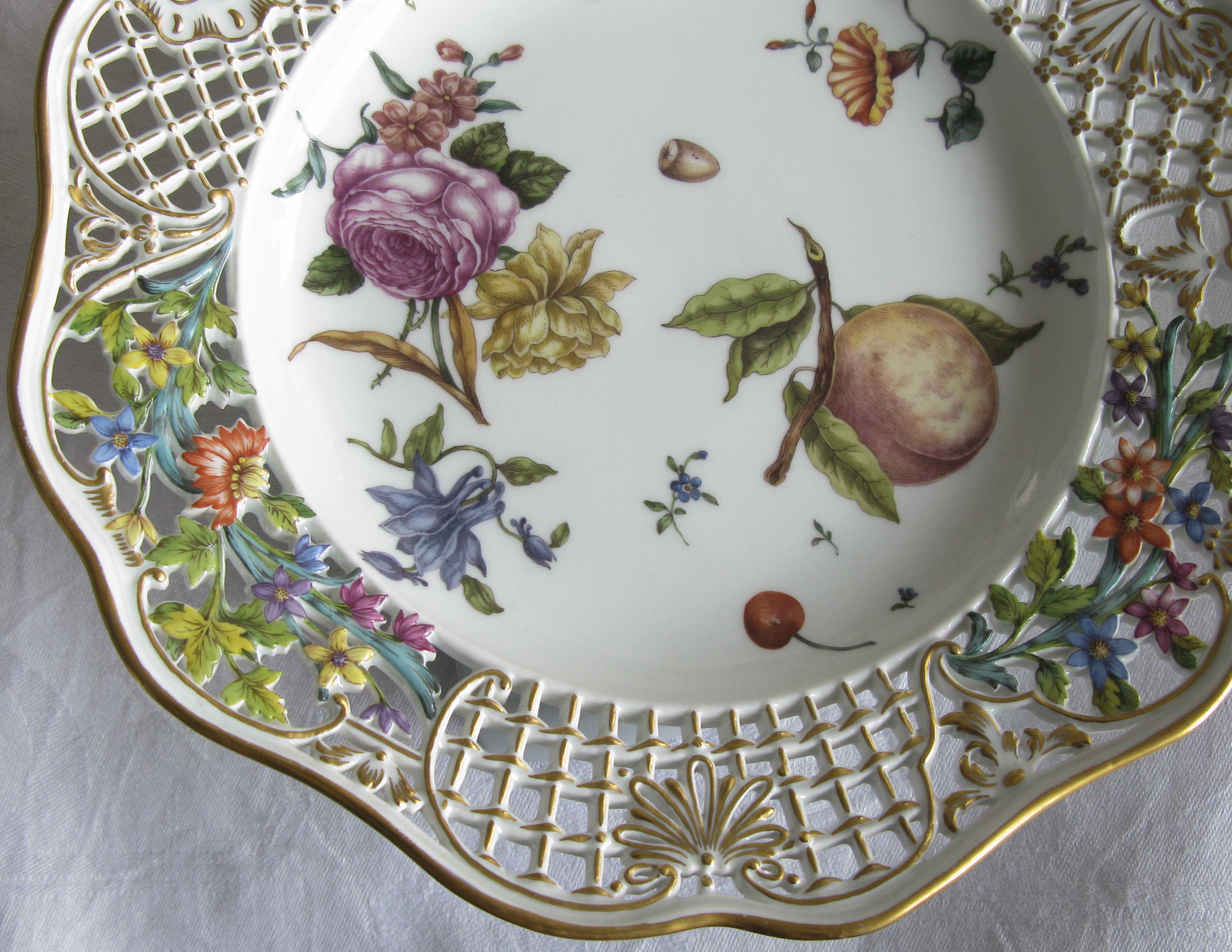 Meißner Porzellan, Dekor: Brühlsches Allerlei